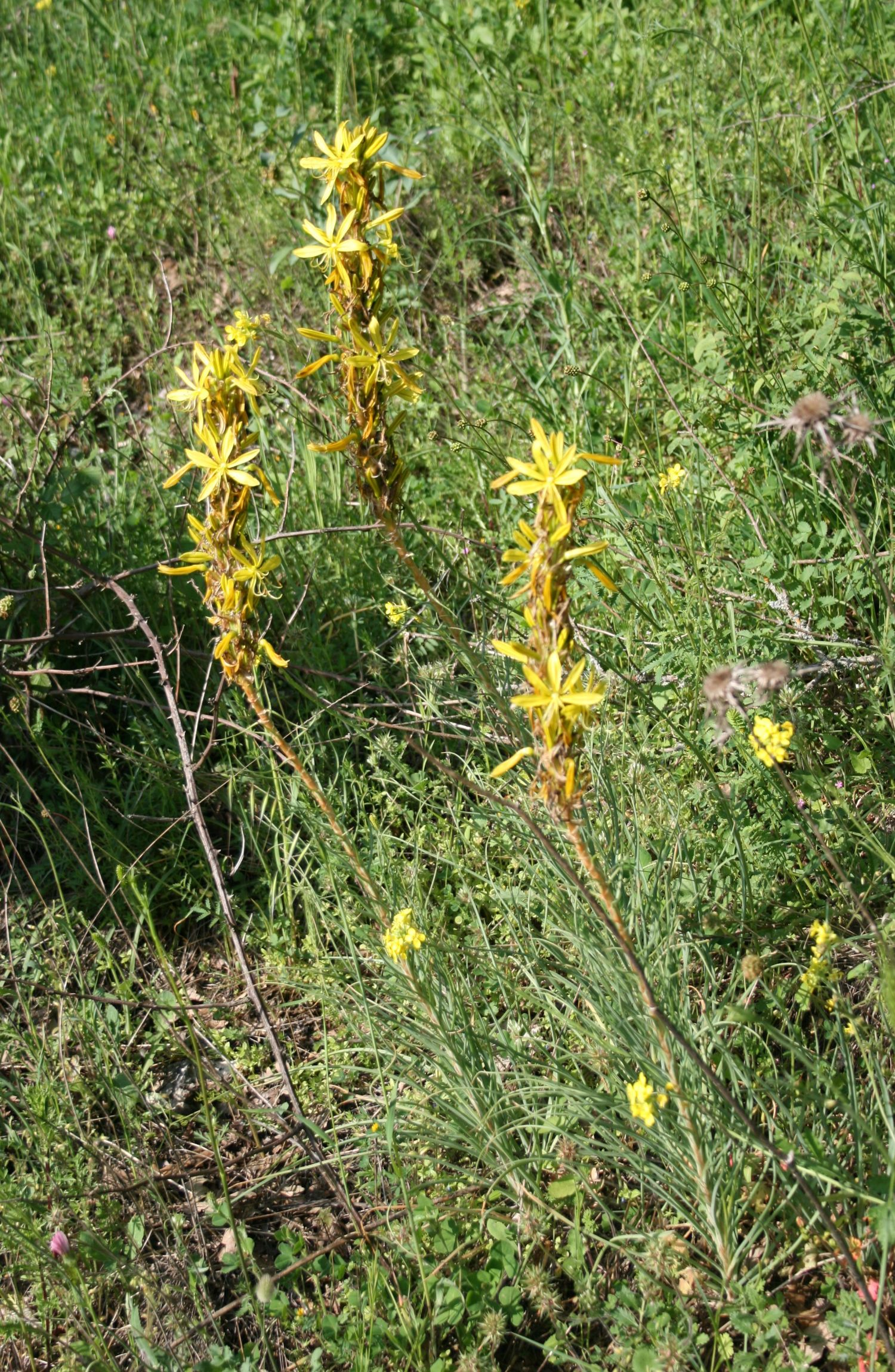 Asphodeline lutea, Affodillgewächse (Asphodelaceae) - Italien/Italia/Italy: Apulien/Puglia, Prov. Foggia, Promontorio del Gargano, S Casa Forestale